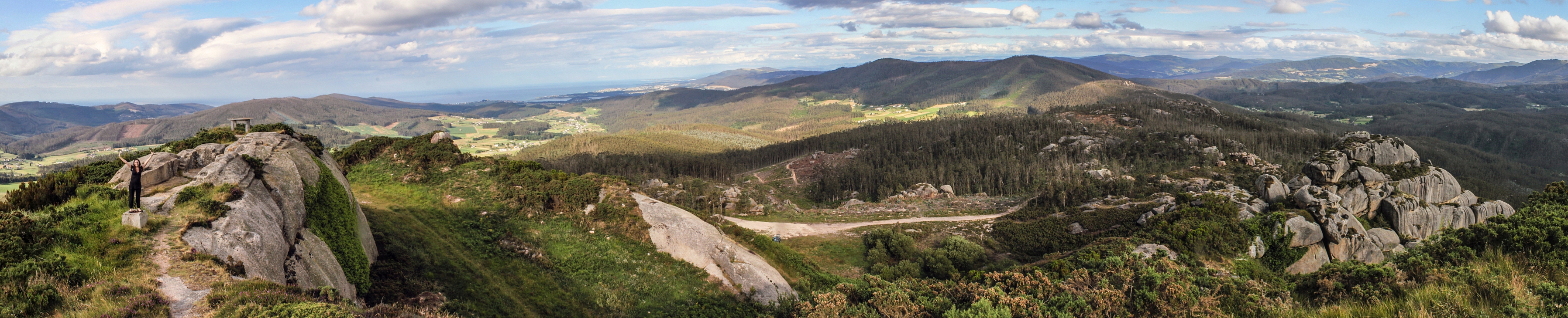 panorámica del Castillo do Frouxeira